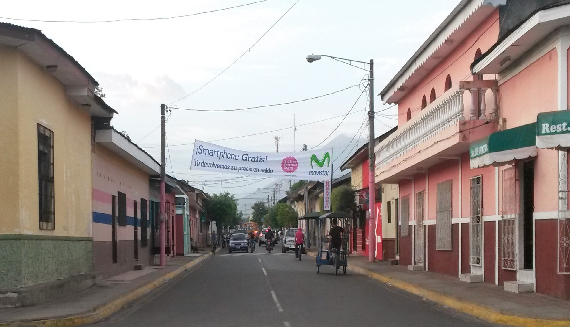 Avenida Con Direcion Norte Al Calvario Y Sur Al Parque M